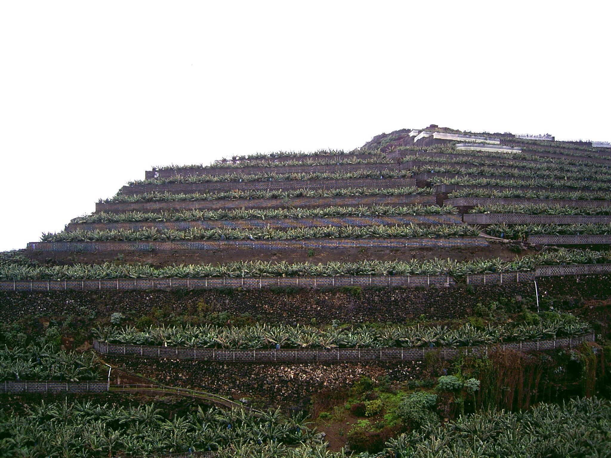 Banana plantation in La Cuesta, San Andrés y Sauces, La Palma, Canary Islands